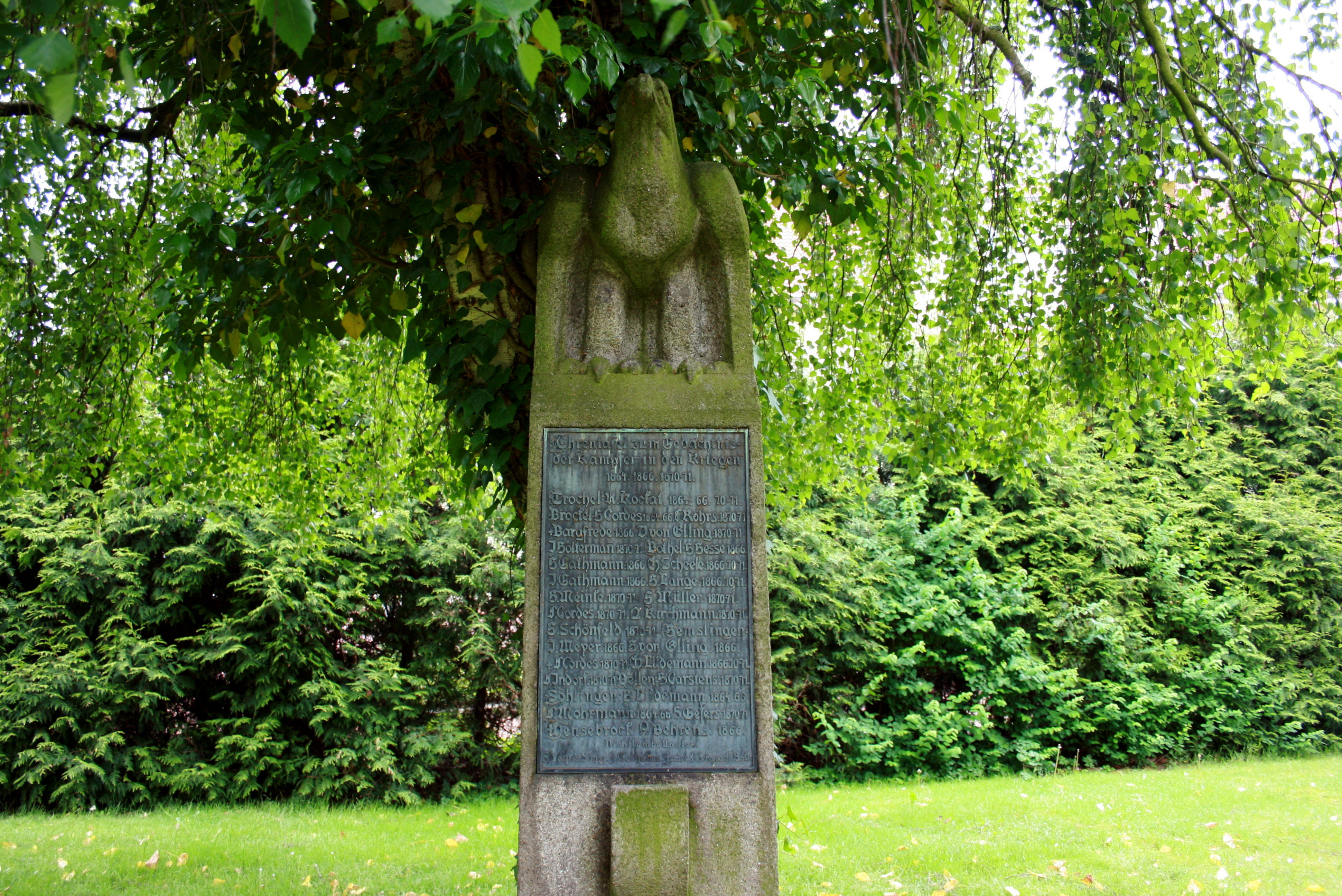 Kriegerdenkmal an der Heilig-Kreuz-Kirche in Brockel, Niedersachsen; vor 1912 von Architekt Emil Högg und Bildhauer Hermann Lüdecke (Bremen)